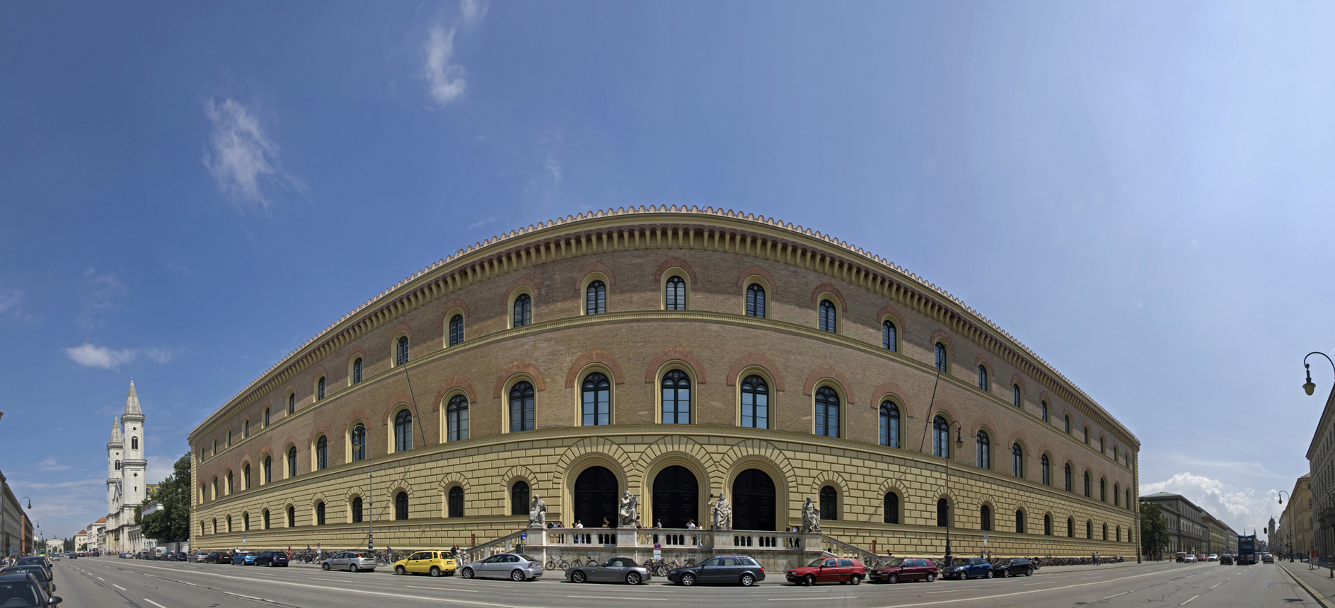 Bayerische Staatsbibliothek - München - Panorama - Blick in Richtung zur Ludwigskirche (links) und zur Feldherrnhalle (rechts), Ludwigstraße 16